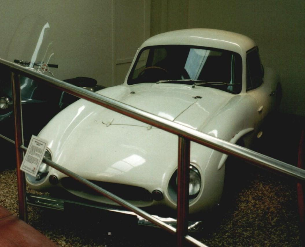 Convair 1957